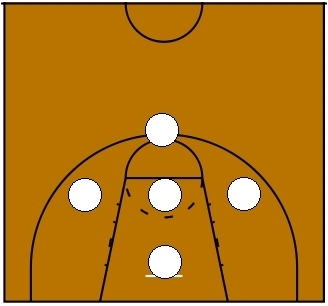 Basketball Zone Defense